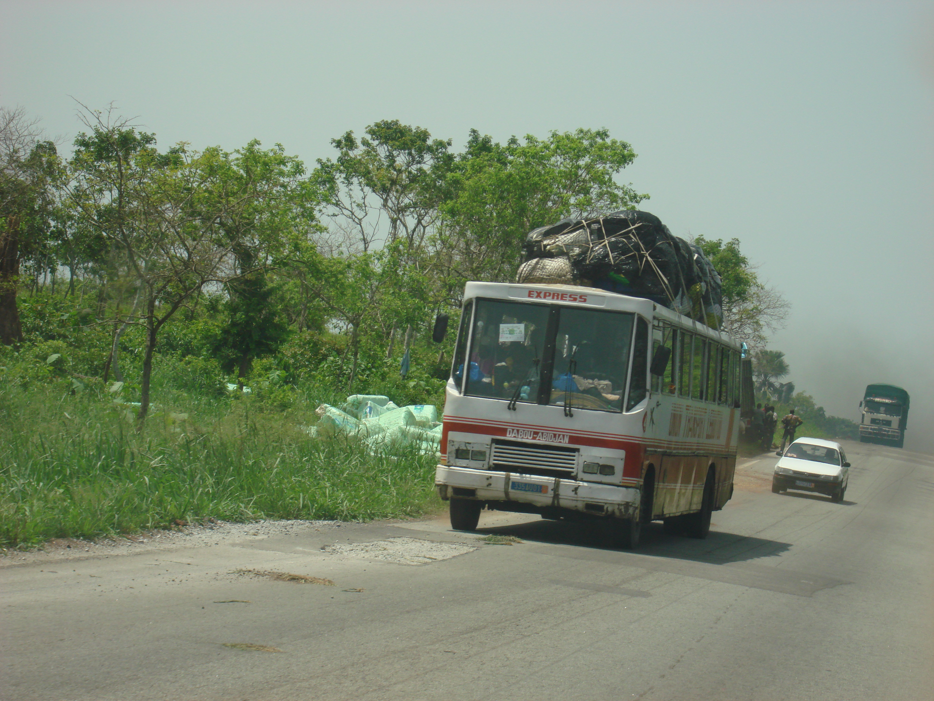 Véhicules de transports routiers en Côte d'Ivoire.